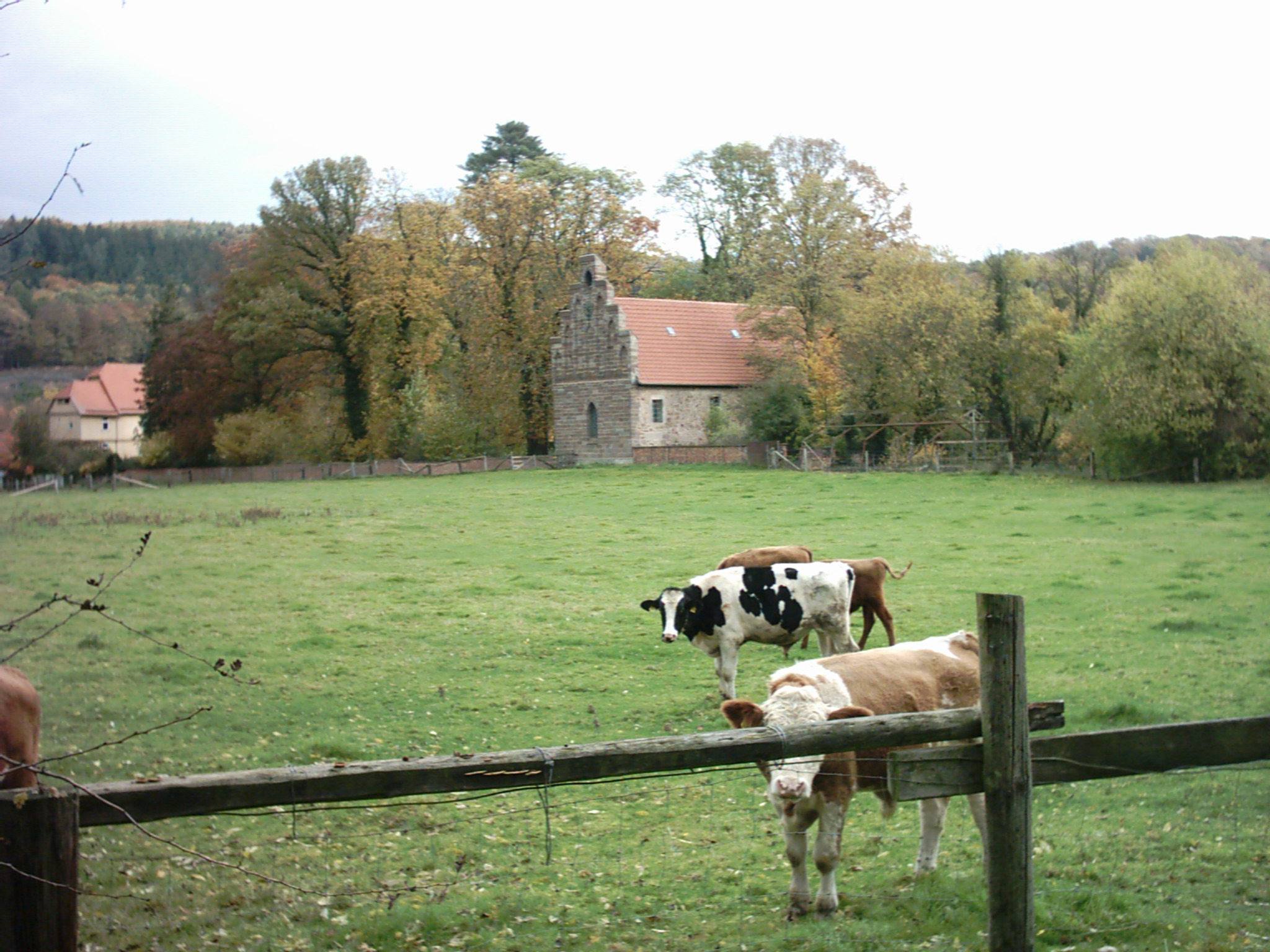 Die gotische Petrus Kirche in Hilwartshausen - selbst fotografiert 1/2005 - GNU-FDL